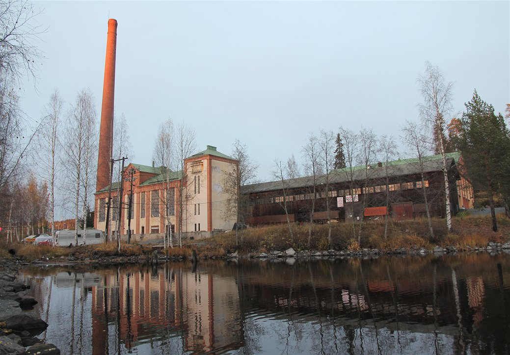 Pitkälahden saha ja Pitkälahden pohjukkaa Kuopion Pitkälahden kaupunginosassa.